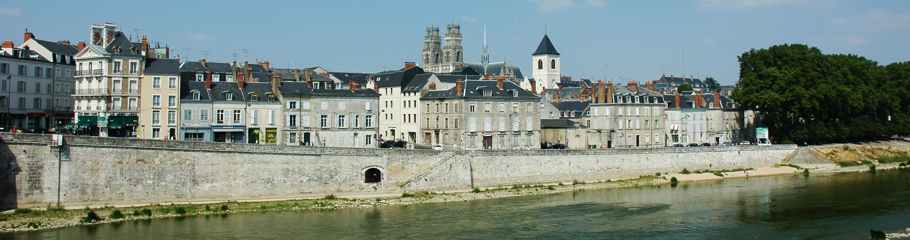 France Loiret Orléans Photographie prise par GIRAUD Patrick